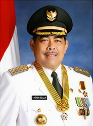 Dari situs resmi pemerintah kota Pekanbaru.